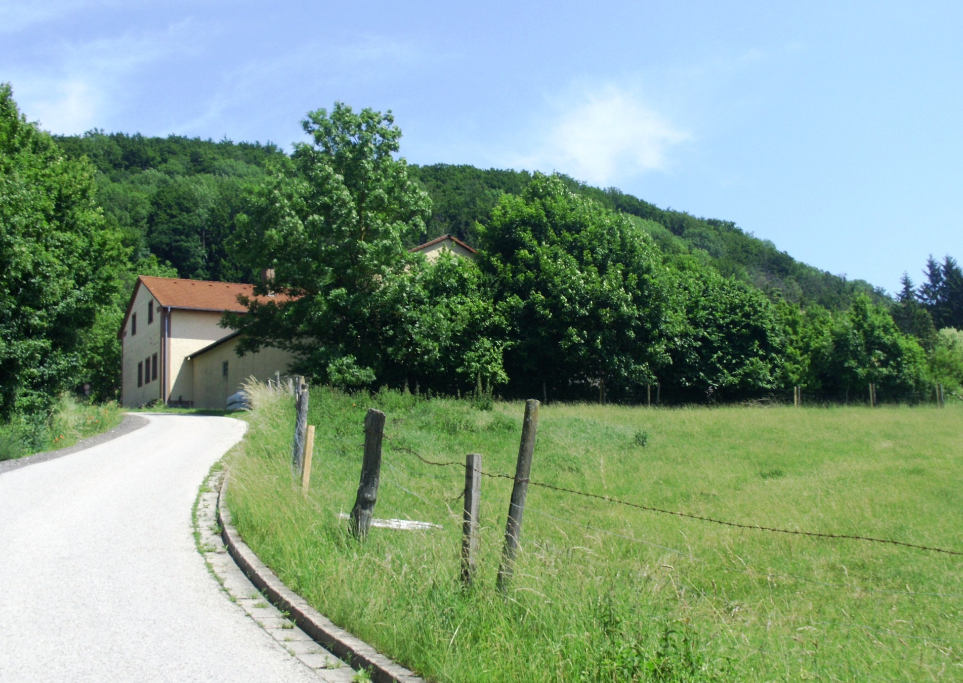 Weinbergshof, Ortsteil von Treuchtlingen im Landkreis Weißenburg-Gunzenhausen